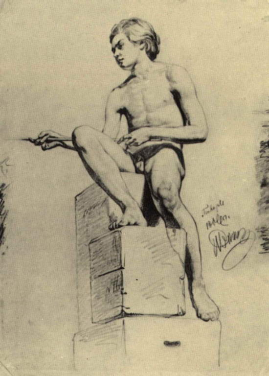 Картина русского Художника И. Е. Репина: Сидящий натурщик (натурщик-юноша)